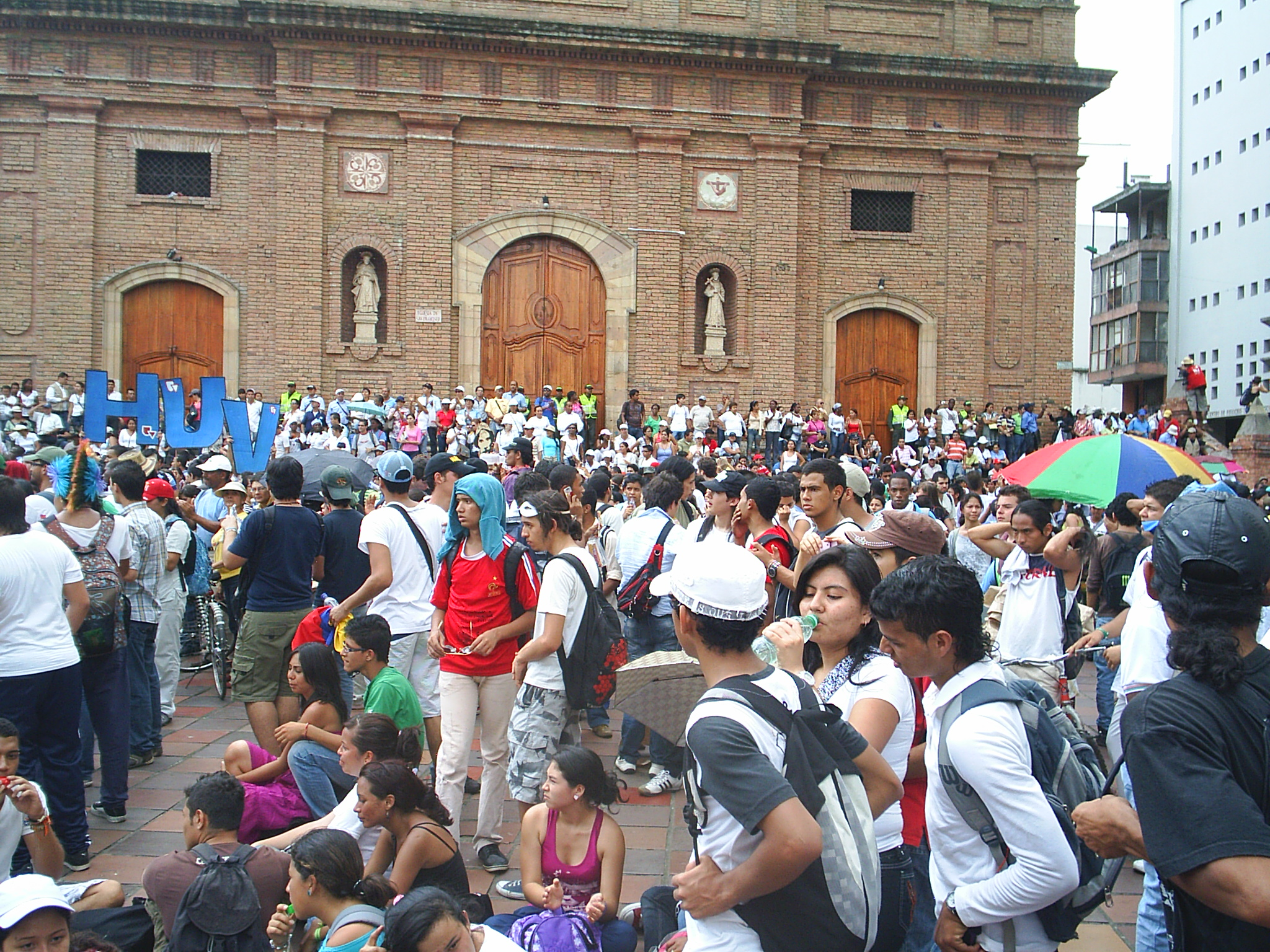 La marcha estudiantil en la gobernación (atrás), al frente la Iglesia de San Francisco